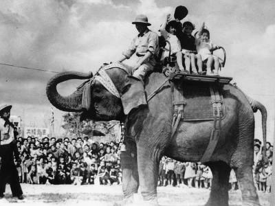 昭和25年(1950年)、移動動物園の開催。日本各地の子供たちから「象を見たい」「象と遊びたい」との声が寄せられ、半年間で東北と北海道を巡回。上野動物園。開園125周年パネル展。インディラと思われる個体。